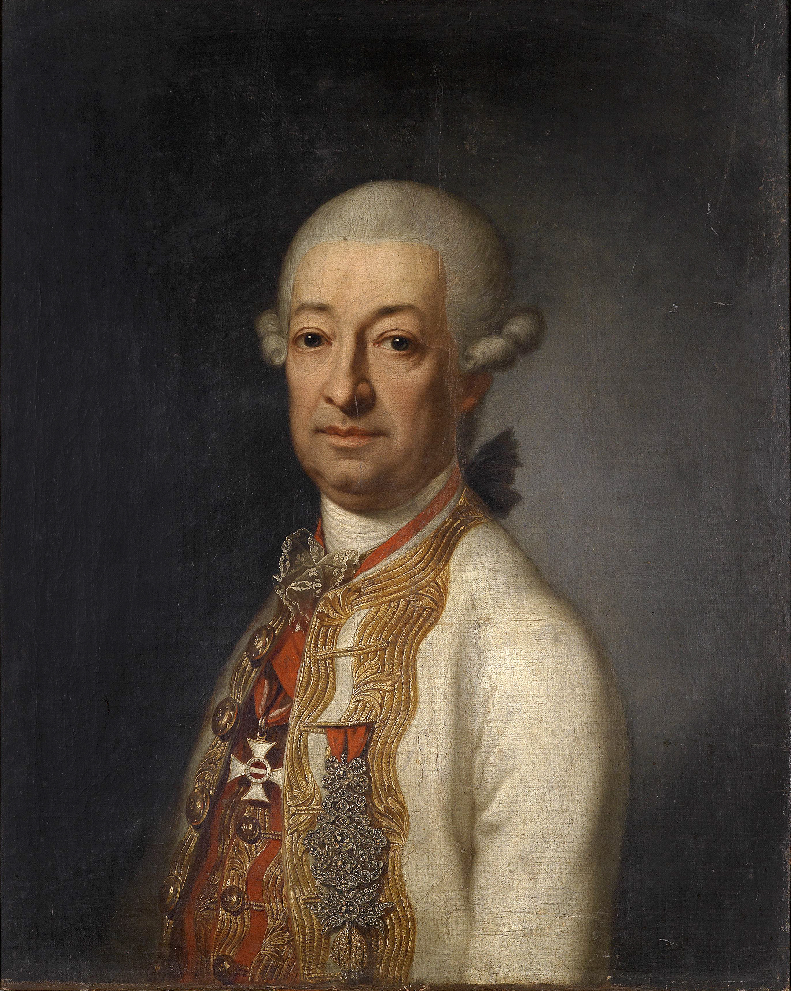 Österreichische Schule der 2. Hälfte des 18. Jahrhunderts: Bildnis des k. k. Feldmarschalls Fürst Franz Ulrich Kinsky von Wchinitz und Tettau (1726-1792) mit dem Kommandeurkreuz des Maria-Theresia-Ordens, Öl auf Leinwand, 65 x 54 cm, rückseitig Johann Baptist Lampi d. Ä. zugeschrieben